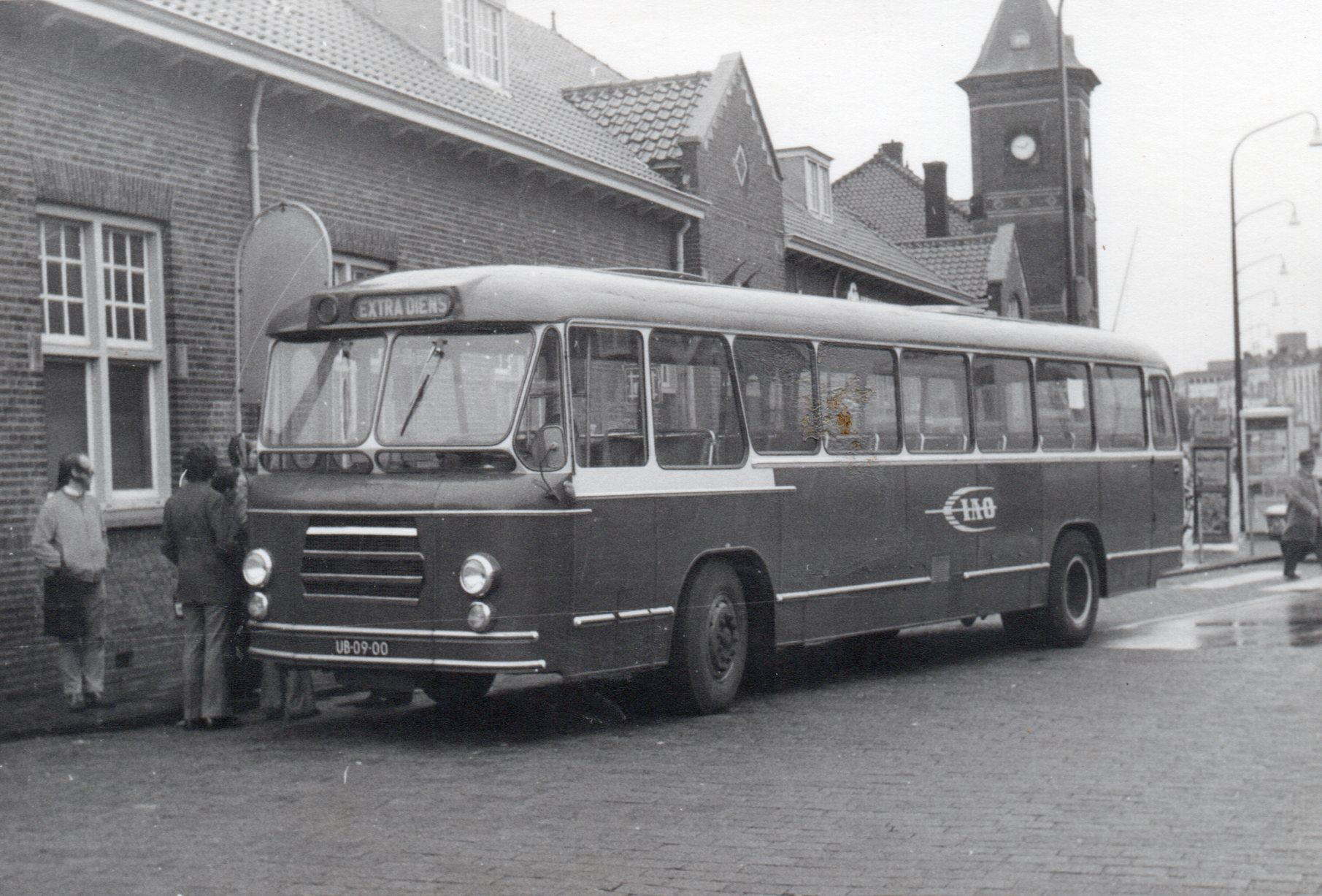 Kromhout/Kusters-bus 14 van Internationale Autobus Onderneming (IAO), firma Römkes, Eygelshoven, ong.1978